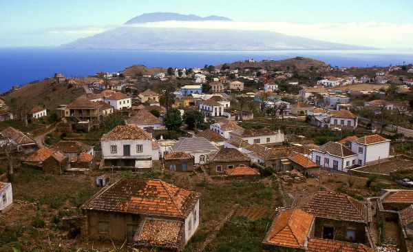 Inselhauptort Vila Nova Sintra auf einem durchschnittlich 450 m hohen Plateau. Im Hintergrund die Insel Fogo